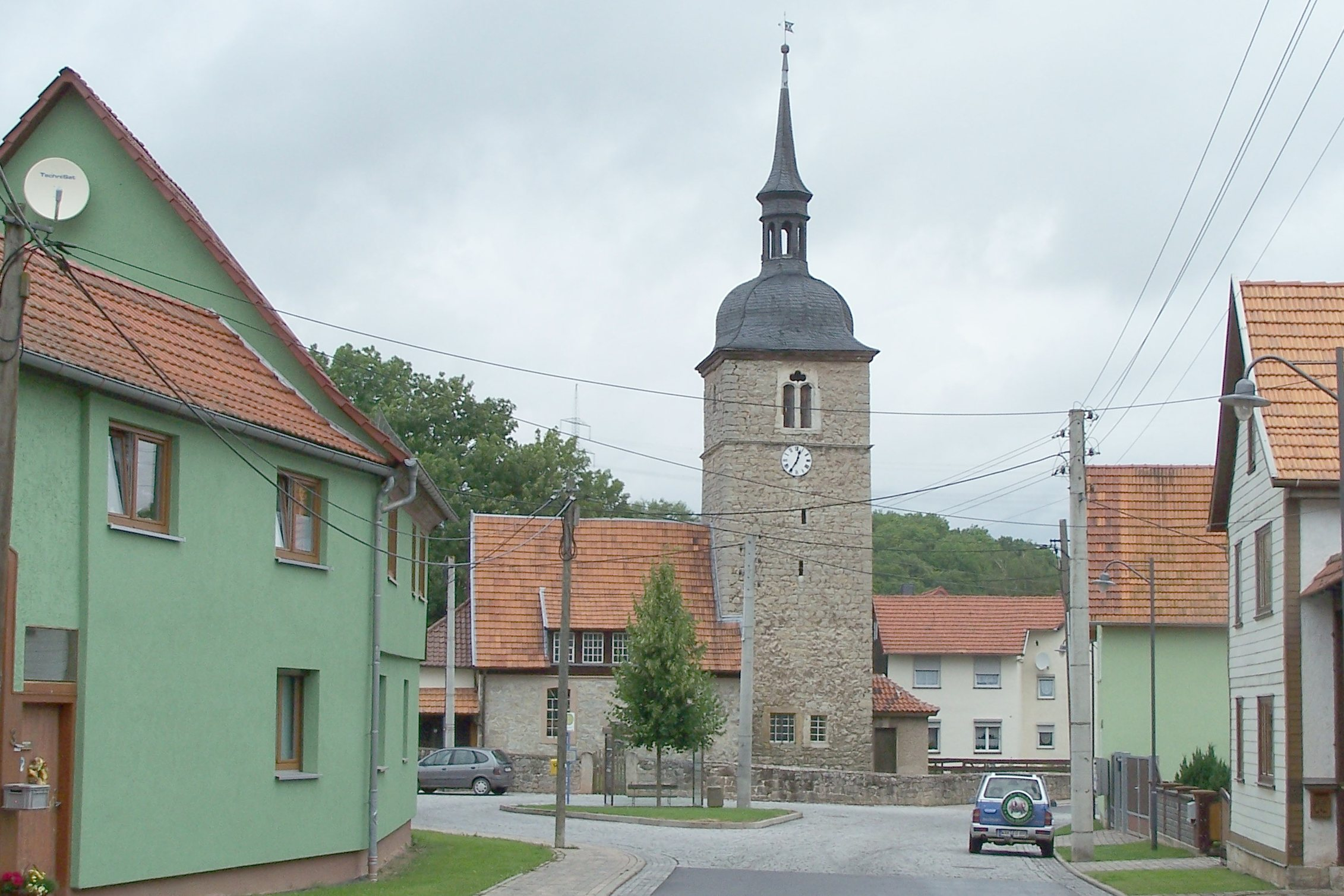 Die Maria-Magdalenen-Kirche in Ettenhausen/Nesse.